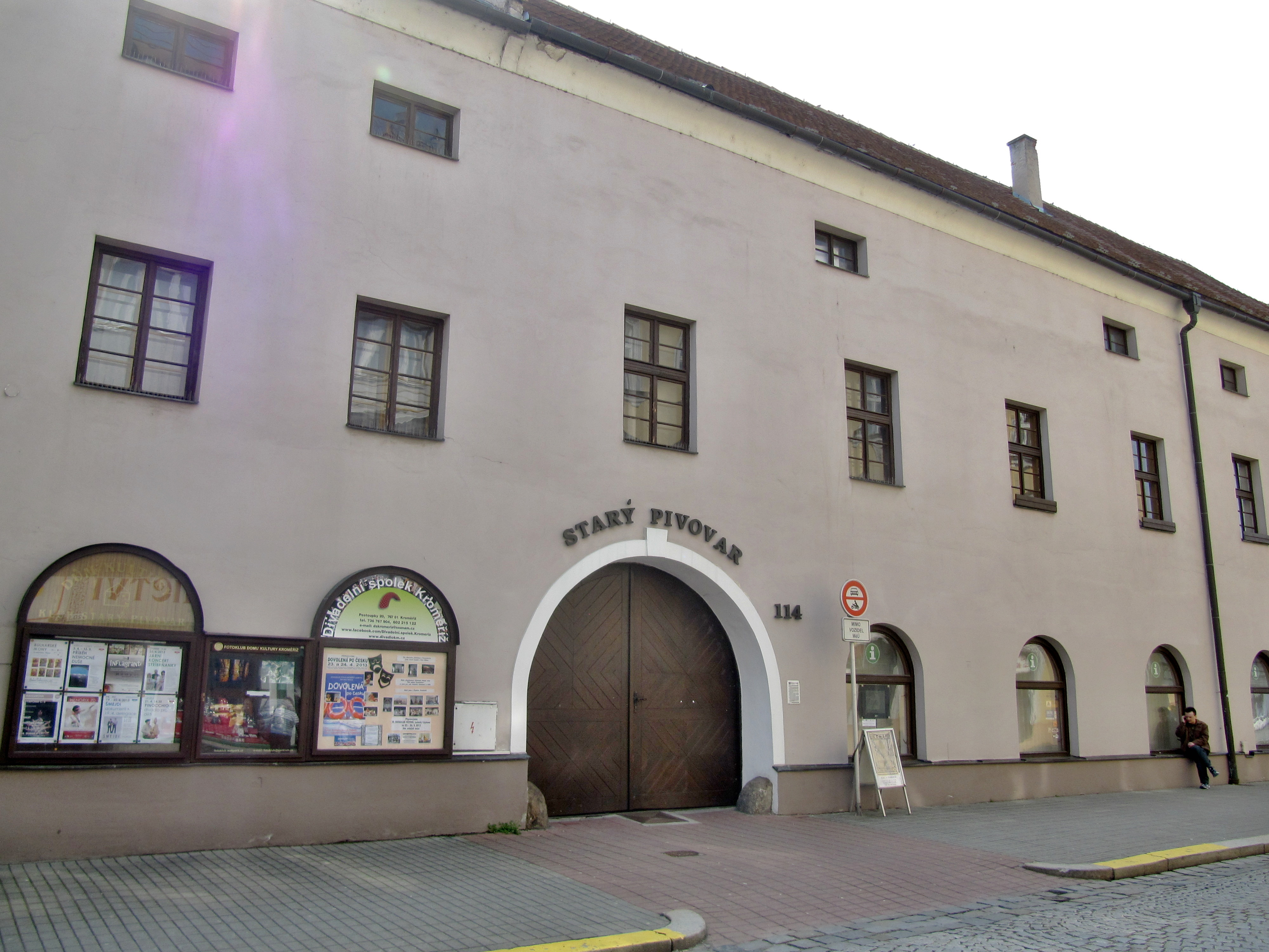 Pivovar (Kroměříž), Prusinovského 114/2, Kroměříž